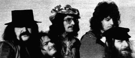 Italian band Delirium